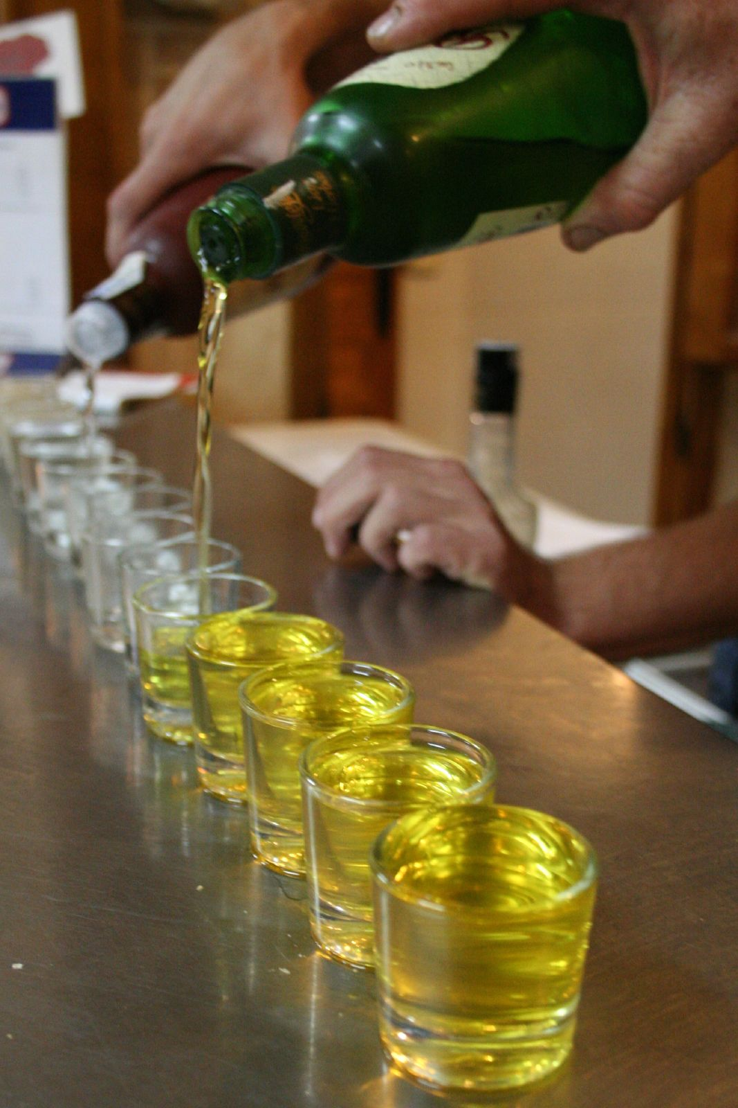 Chupitos.